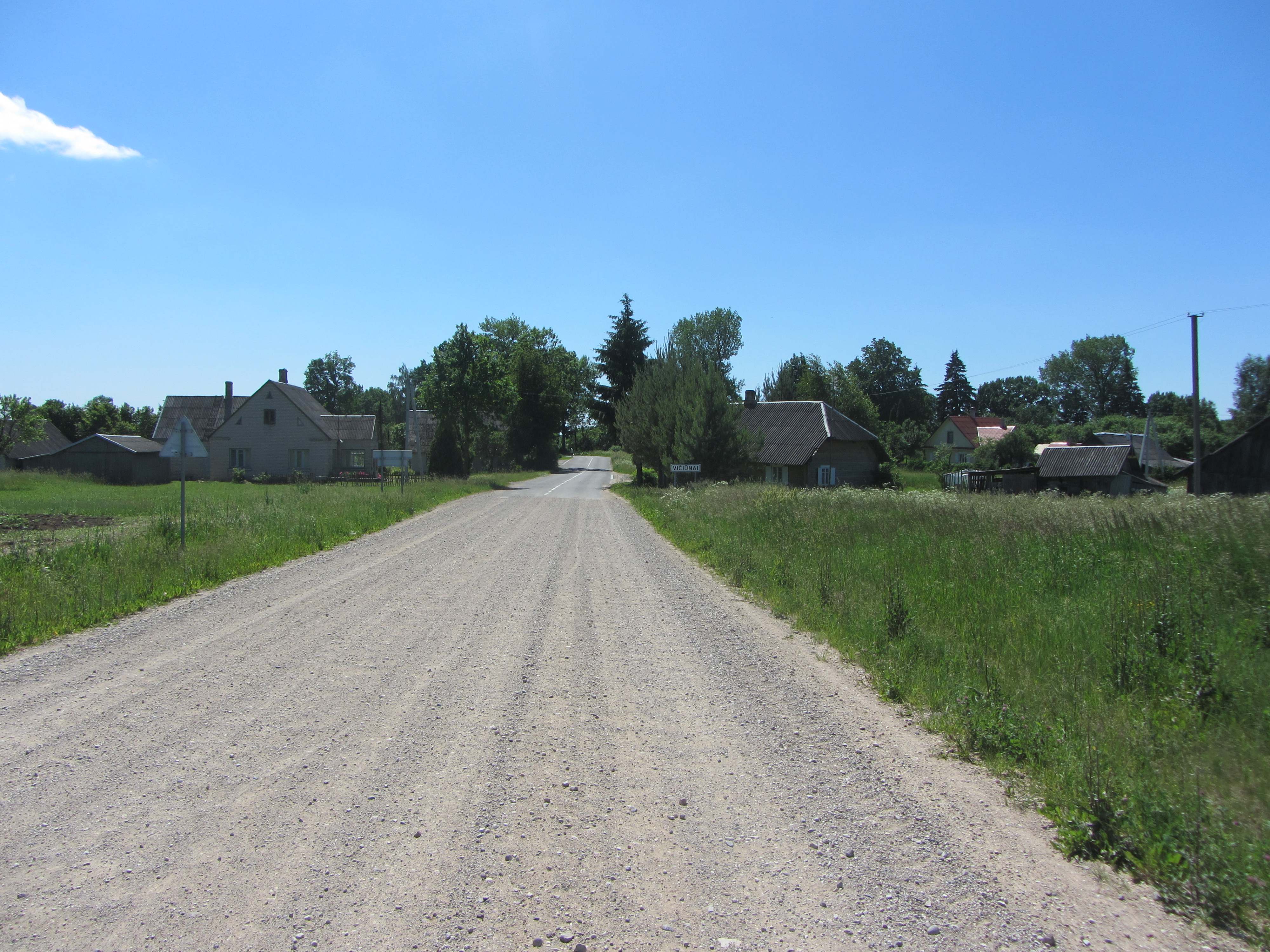 Vičiūnai 19145, Lithuania